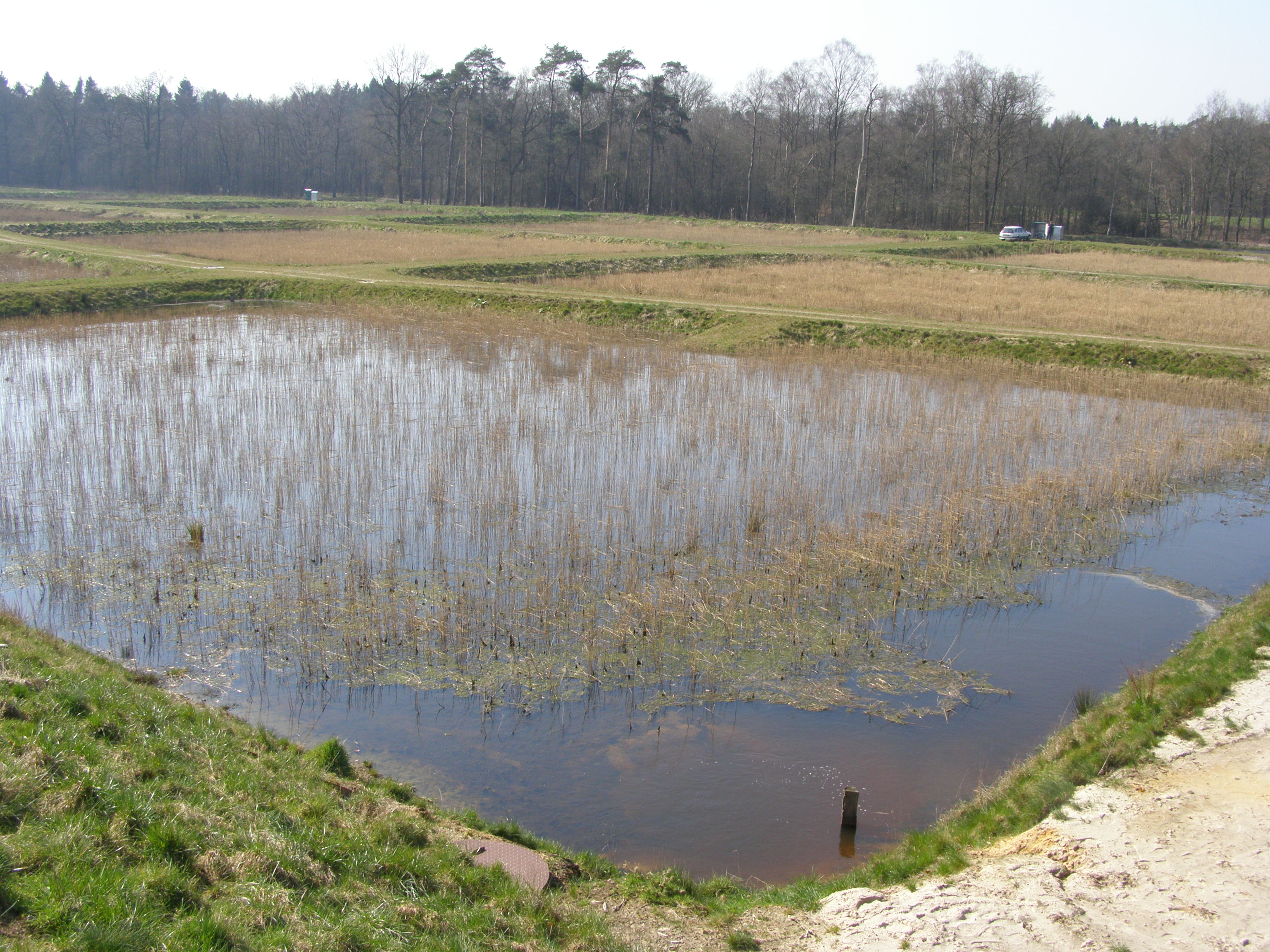 eigen werk